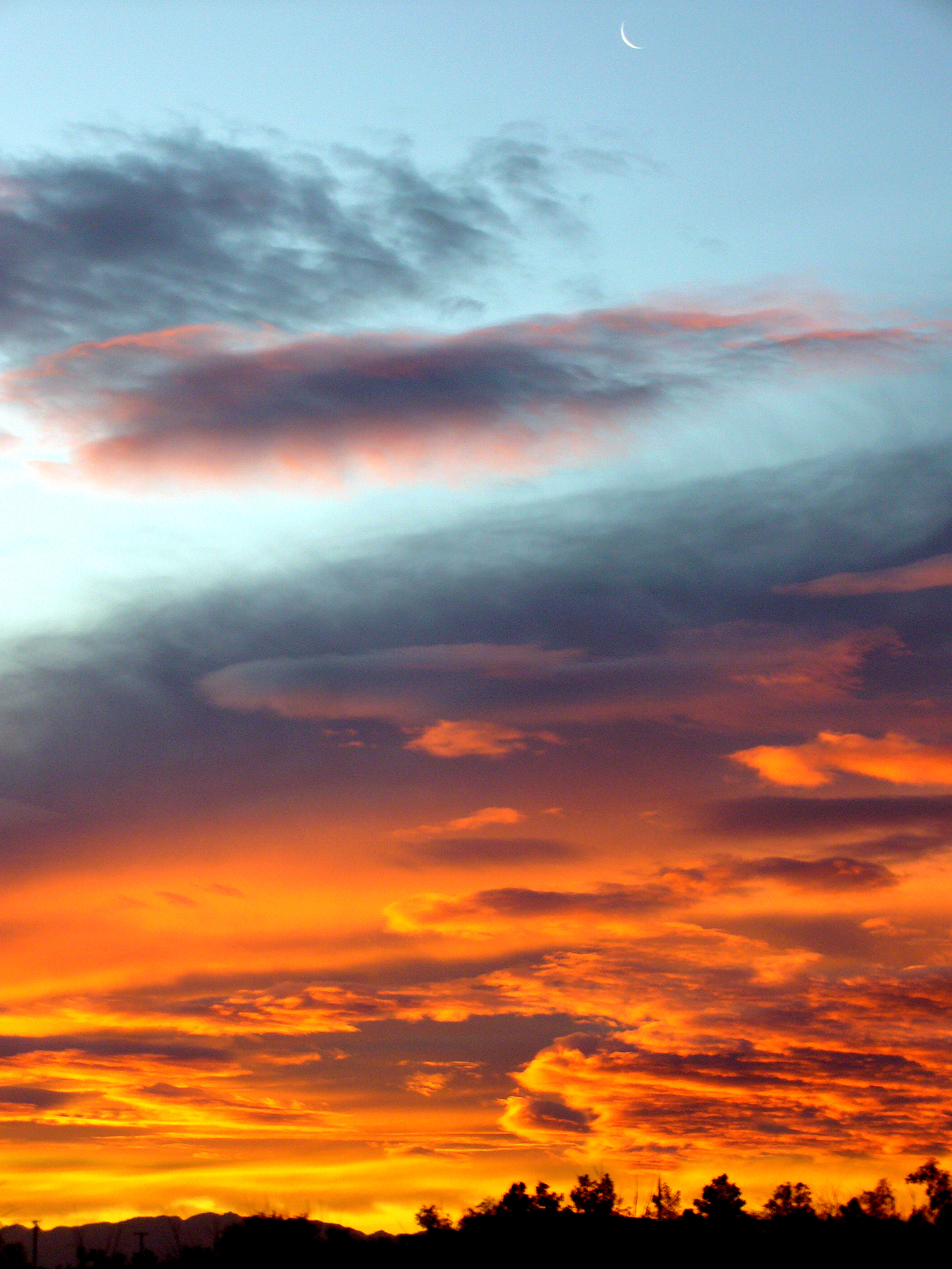 The Crescent Moon remains visable just moments before Sunrise.